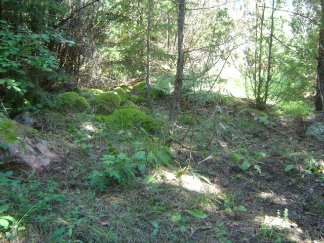 Maalinna kivist ring